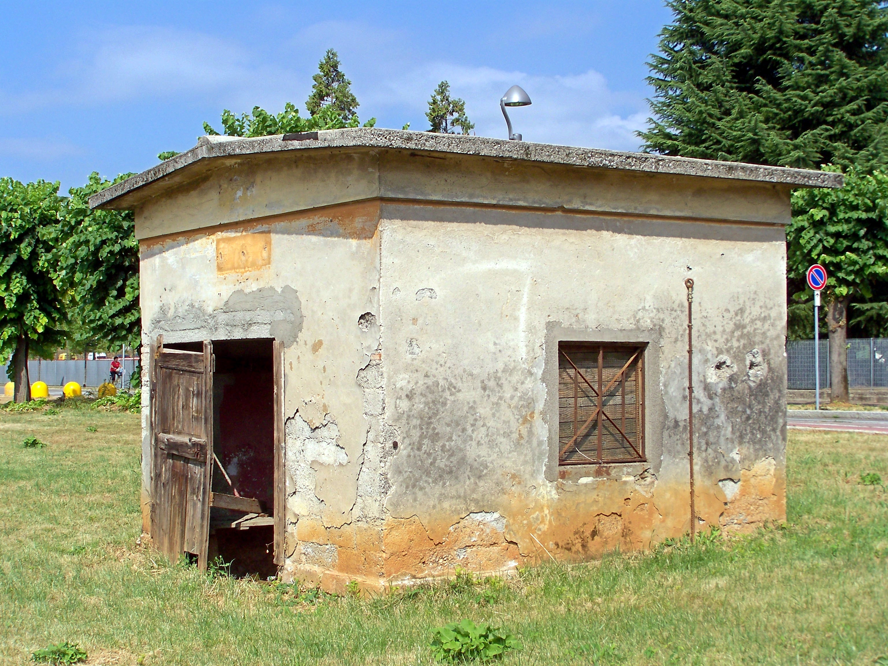 Il magazzino attrezzi della dismessa stazione di Nembro